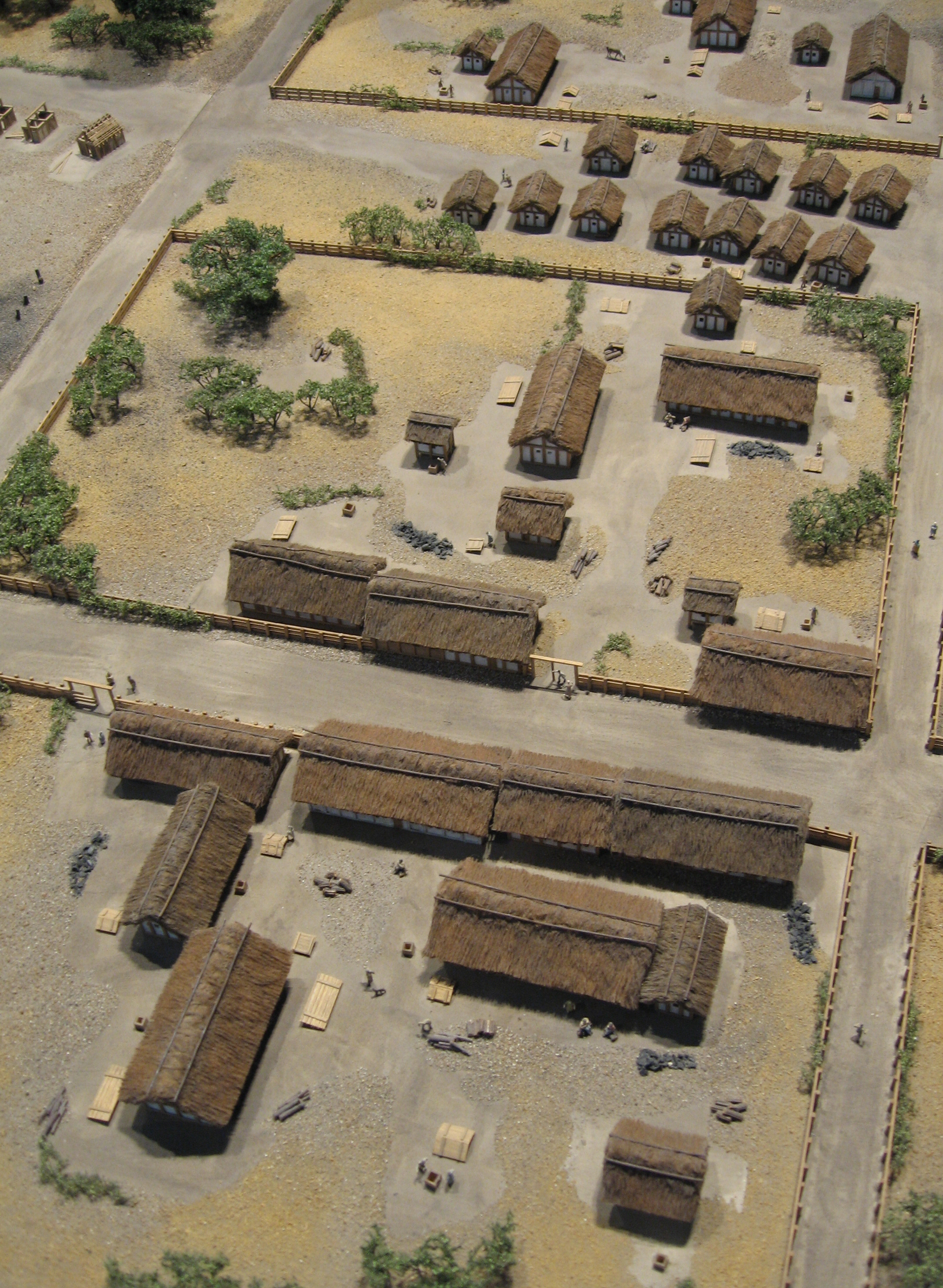 Rekonstruktion der Siedlungsfläche "Zentralfläche" des Oppidum Manching (Keltenmuseum Manching)